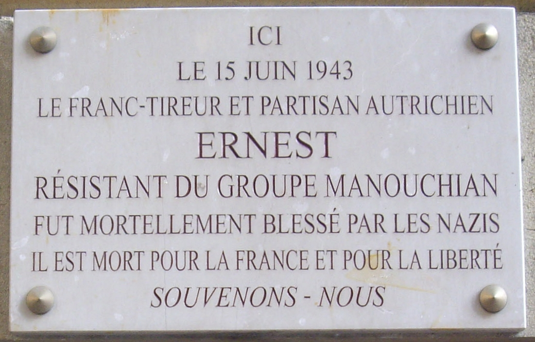 Plaque commémorative, 17 rue Mirabeau, Paris 16e. « Ici, le 15 juin 1943, le franc-tireur et partisan autrichien Ernest, résistant du groupe Manouchian, fut mortellement blessé par les nazis. Il est mort pour la France et pour la liberté. Souvenons-nous. »